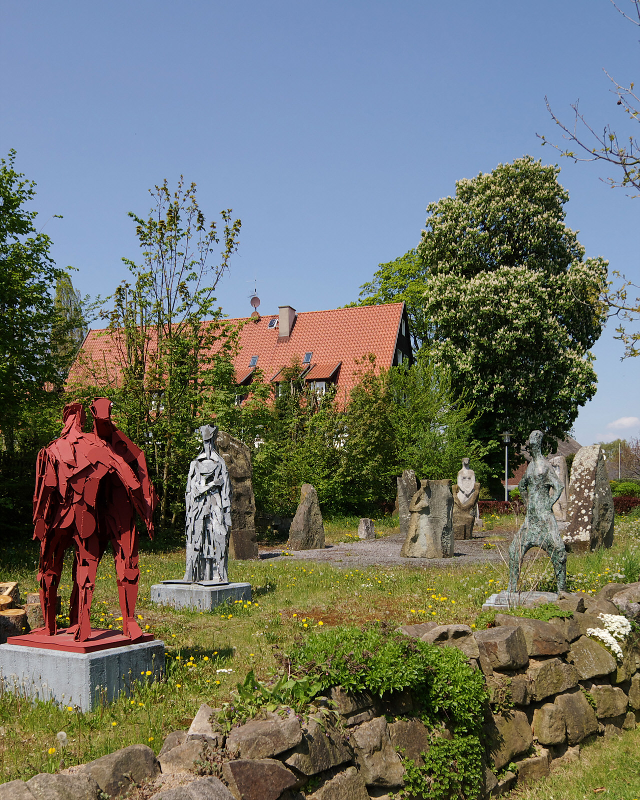 Im Außenbereich des Ernst-Oldenburg-Hauses in Unna-Kessebüren, letzte Wohn- und Wirkungsstätte das Malers, Grafikers und Bildhauers Ernst Oldenburg, finden sich einige, teils unvollendete Skulpturen